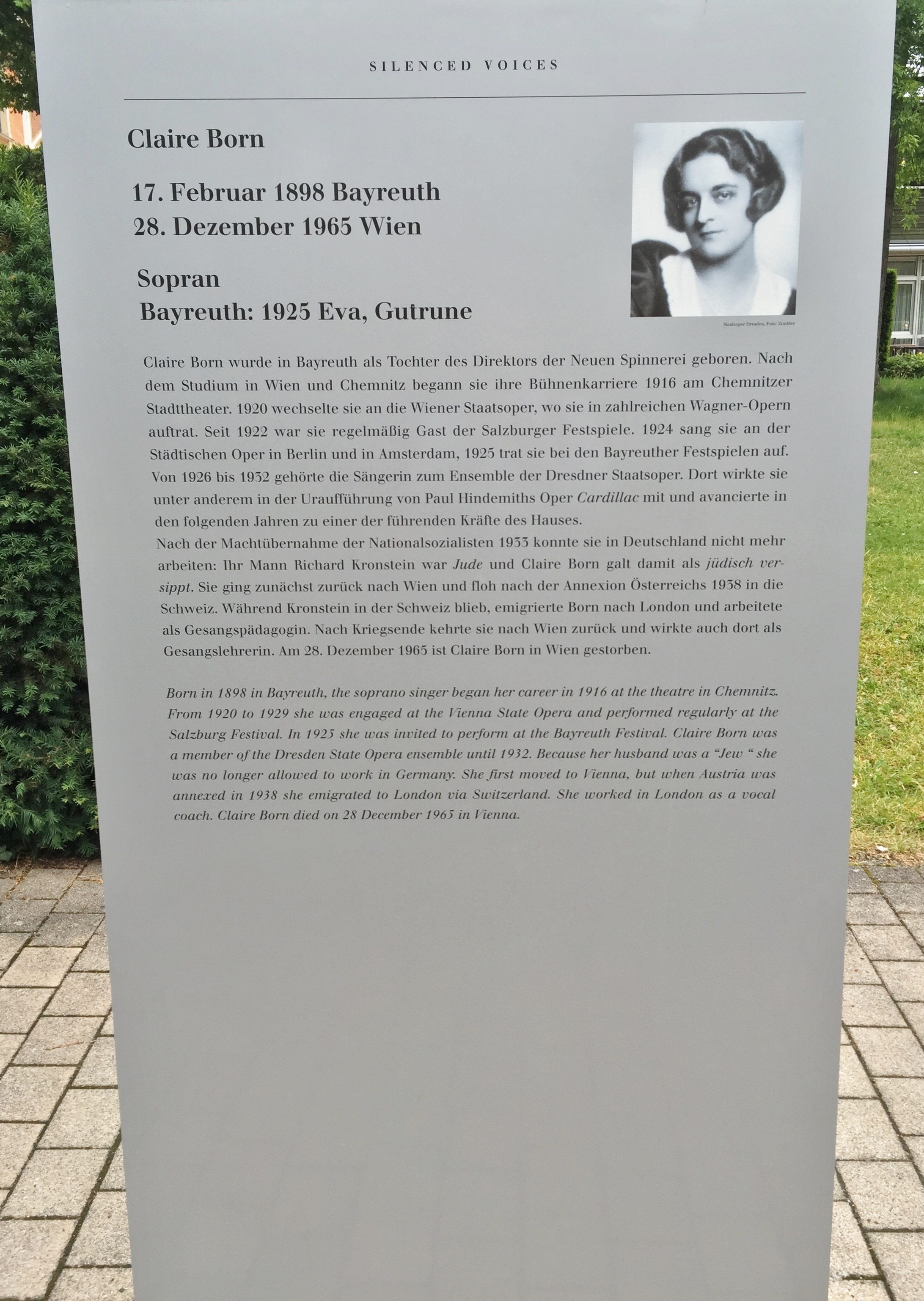 "Verstummte Stimmen - Die Bayreuther Festspiele und die 'Juden' 1876 bis 1945", Ausstellung 2016